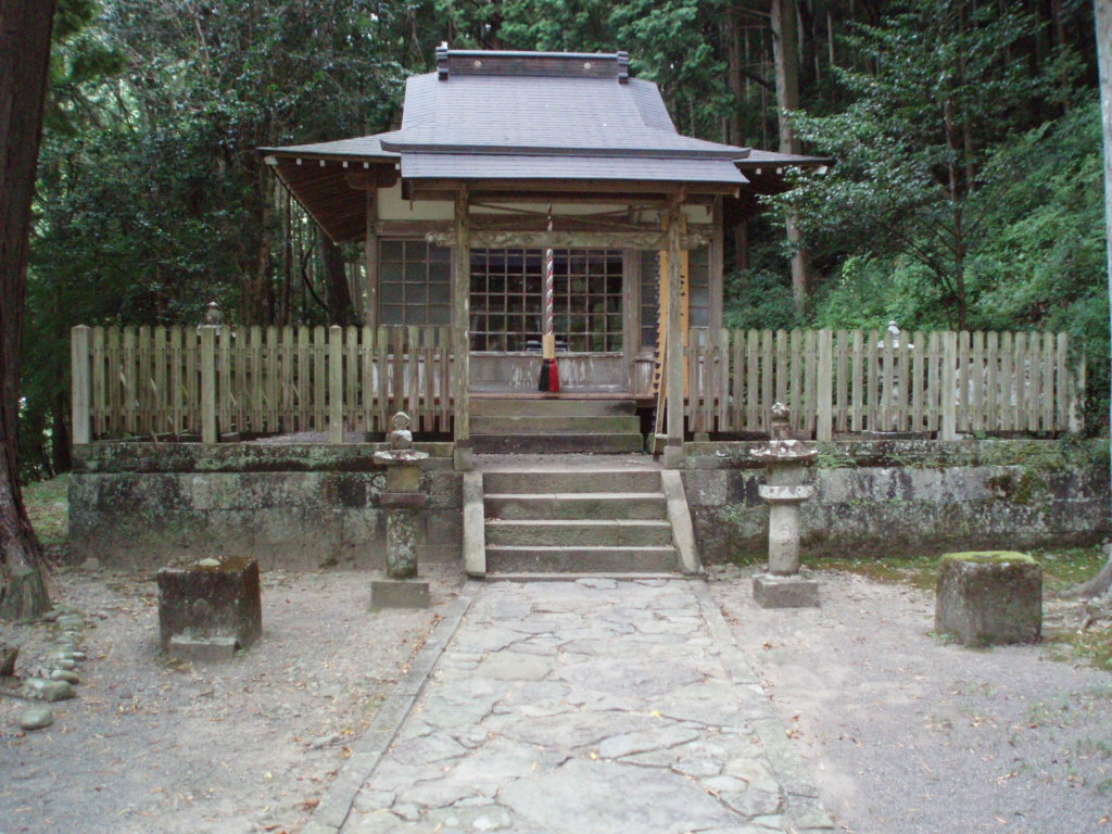 Takijiri-oji_shrine_2